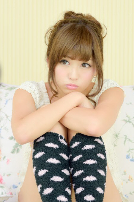 2015年能勢ひとみ